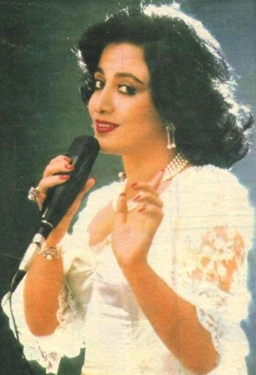 Homeyra, Iranian singer.